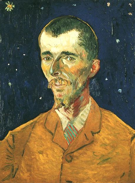 Portrait d'Eugène Boch